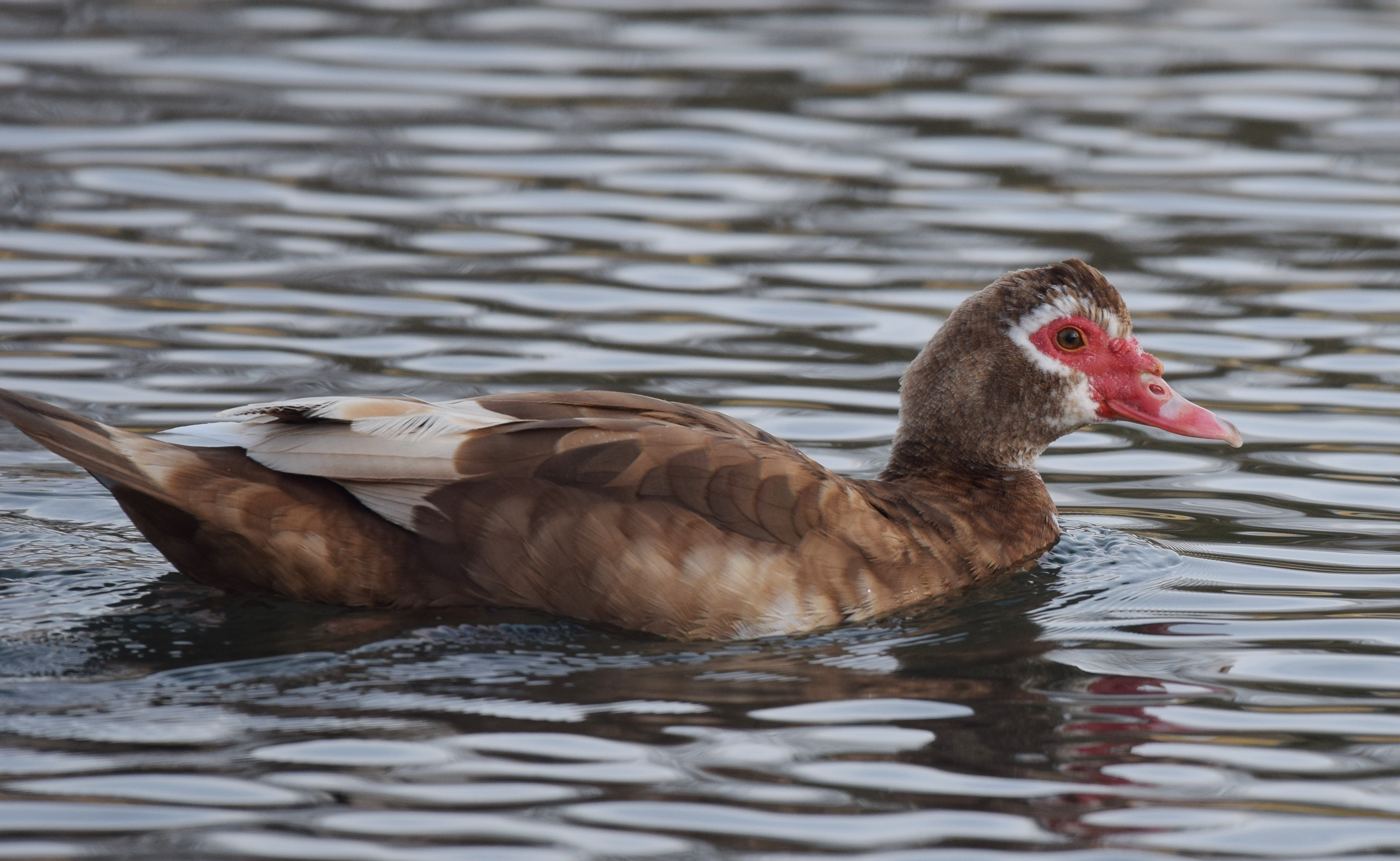 Carondelet Park 1/24/16